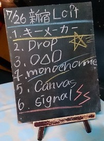 amiinaセトリボード(20150726(1))